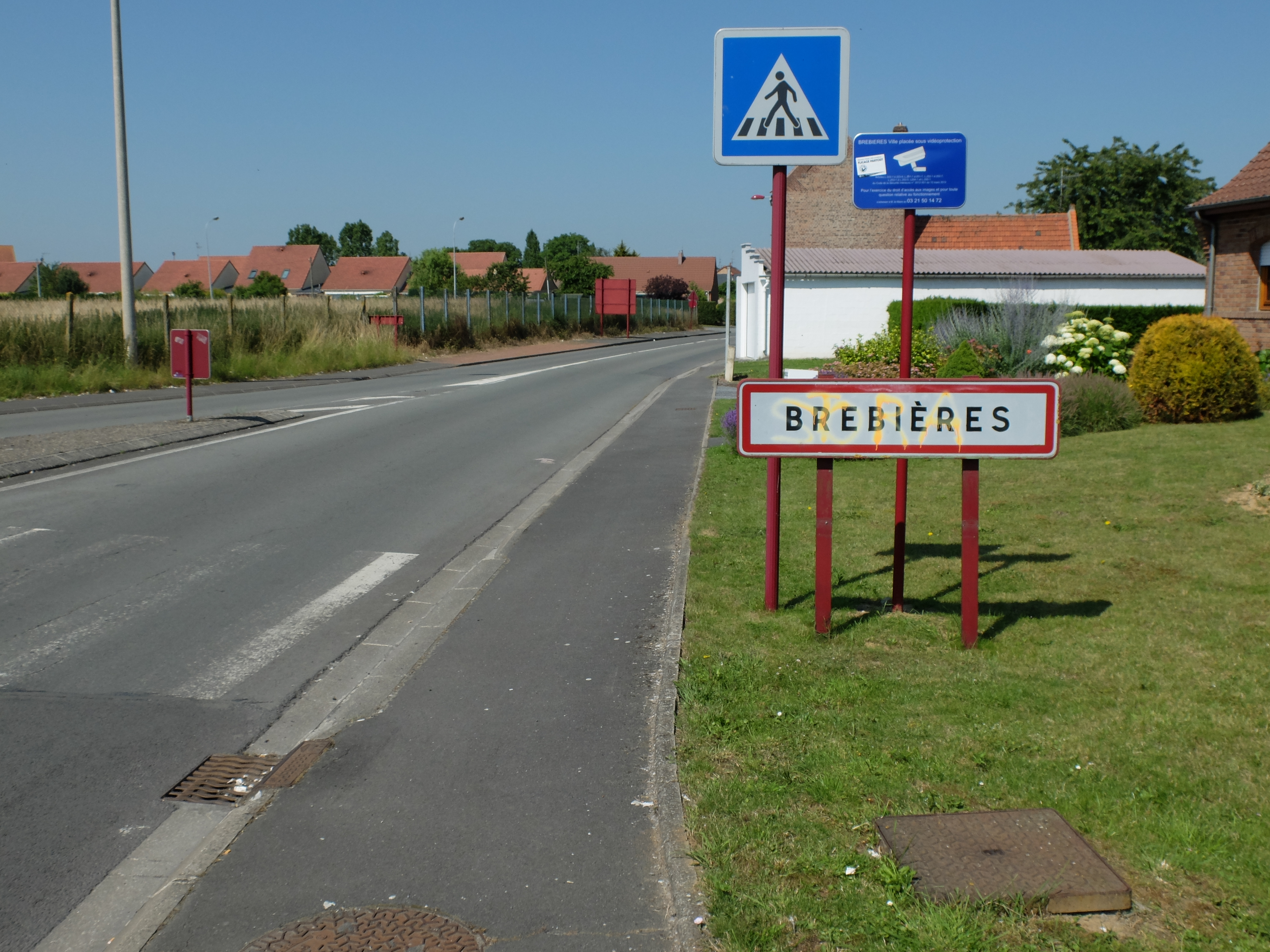 Vue d'une entrée de la commune de Brebières.